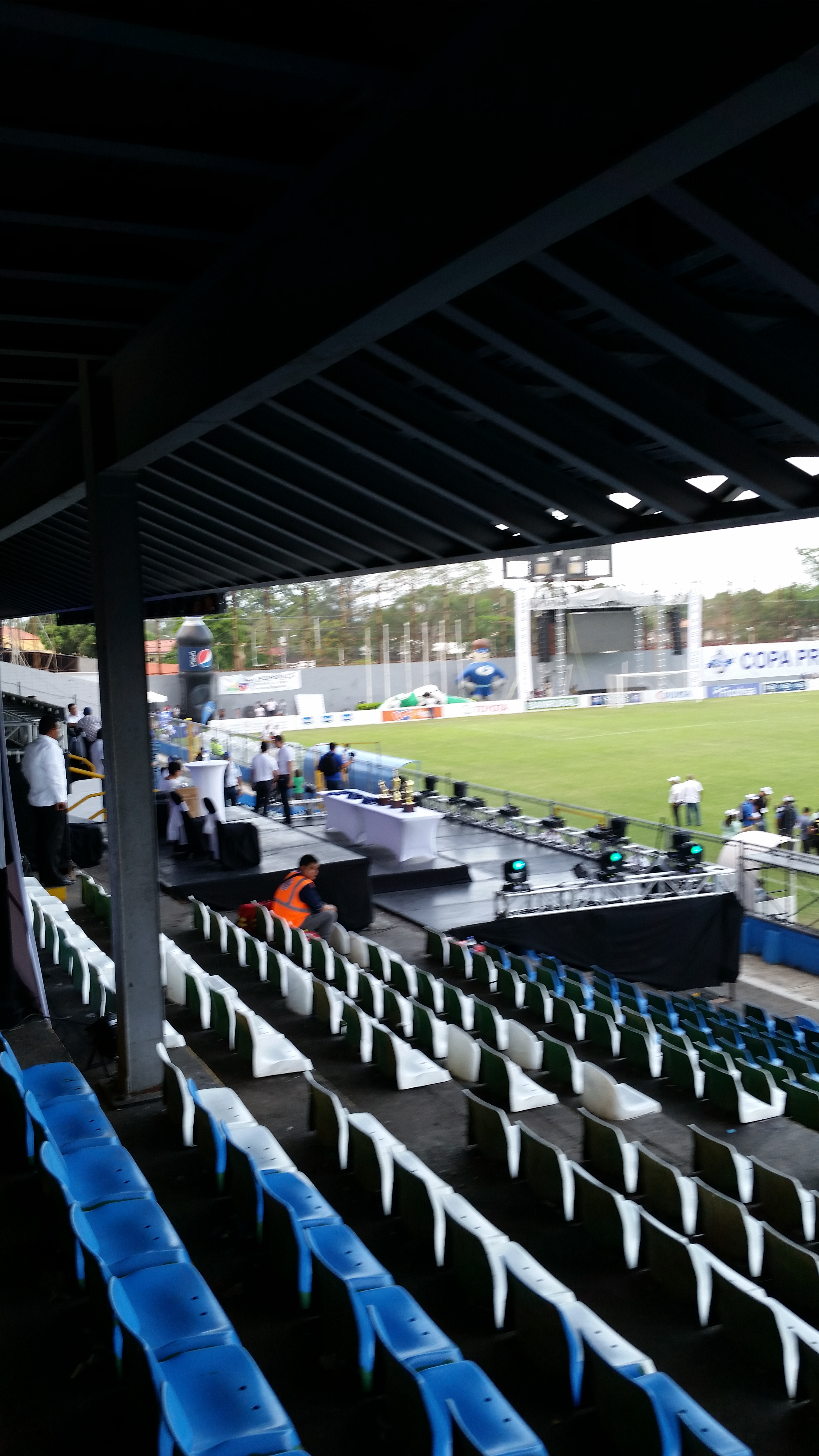 Seccion de Silla del estadio General Francisco Morazan